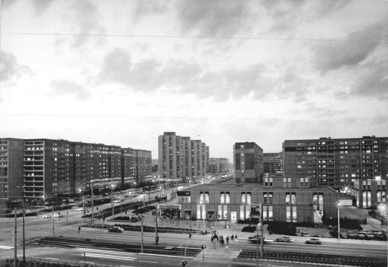 ADN-ZB-Grimm-12.10.88-pra-Berlin: Wohnungsbau - Der junge Stadtbezirk Hohenschönhausen im Nordosten der Hauptstadt hat mit 100 000 Einwohnern die Dimension einer Großstadt. Seit der Grundsteinlegung für die ersten Neubauten im Februar 1984 entstanden mehr als 22 500 Wohnungen und weitere Einrichtungen. Ein modernes Einkaufszentrum ist das Handelshaus am Prerower Plaltz. Seit dem VIII. Parteitag der SED wurden in der DDR drei Millionen Wohnungen neugebaut bzw. modernisiert. Damit verbesserten sich seit 1971 die Wohnverhältnisse für mehr als die Hälfte aller Einwohner der Republik. -siehe auch 1988-1012,13,14,15 und 16N sowie ADN-Meldung